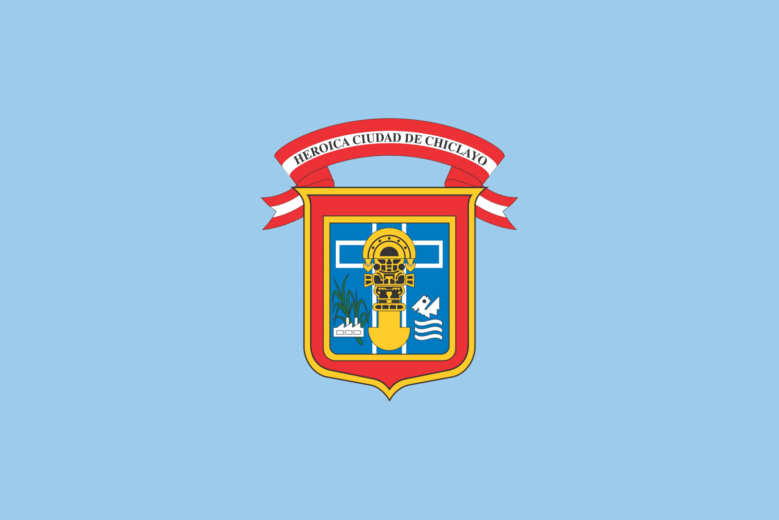 Bandera de Chiclayo, capital del departamento de Lambayeque.